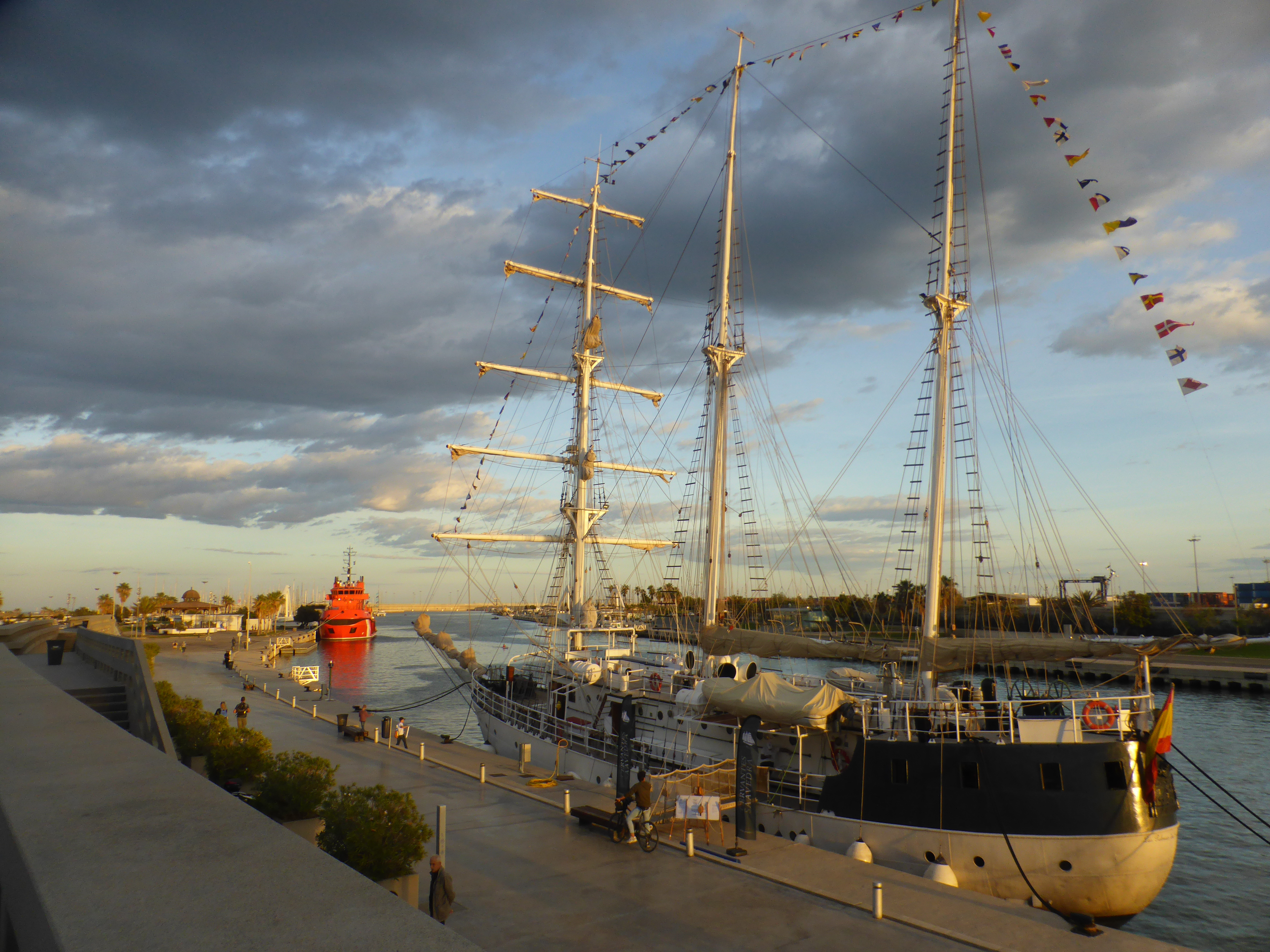 Este buque fue originalmente un buque-faro sueco, construido en 1934. En 1981 se transformó en velero. Actualmente lleva el nombre "Cervantes Saavedra", pero anteriormente se llamó "Amorina". Es de bandera española.